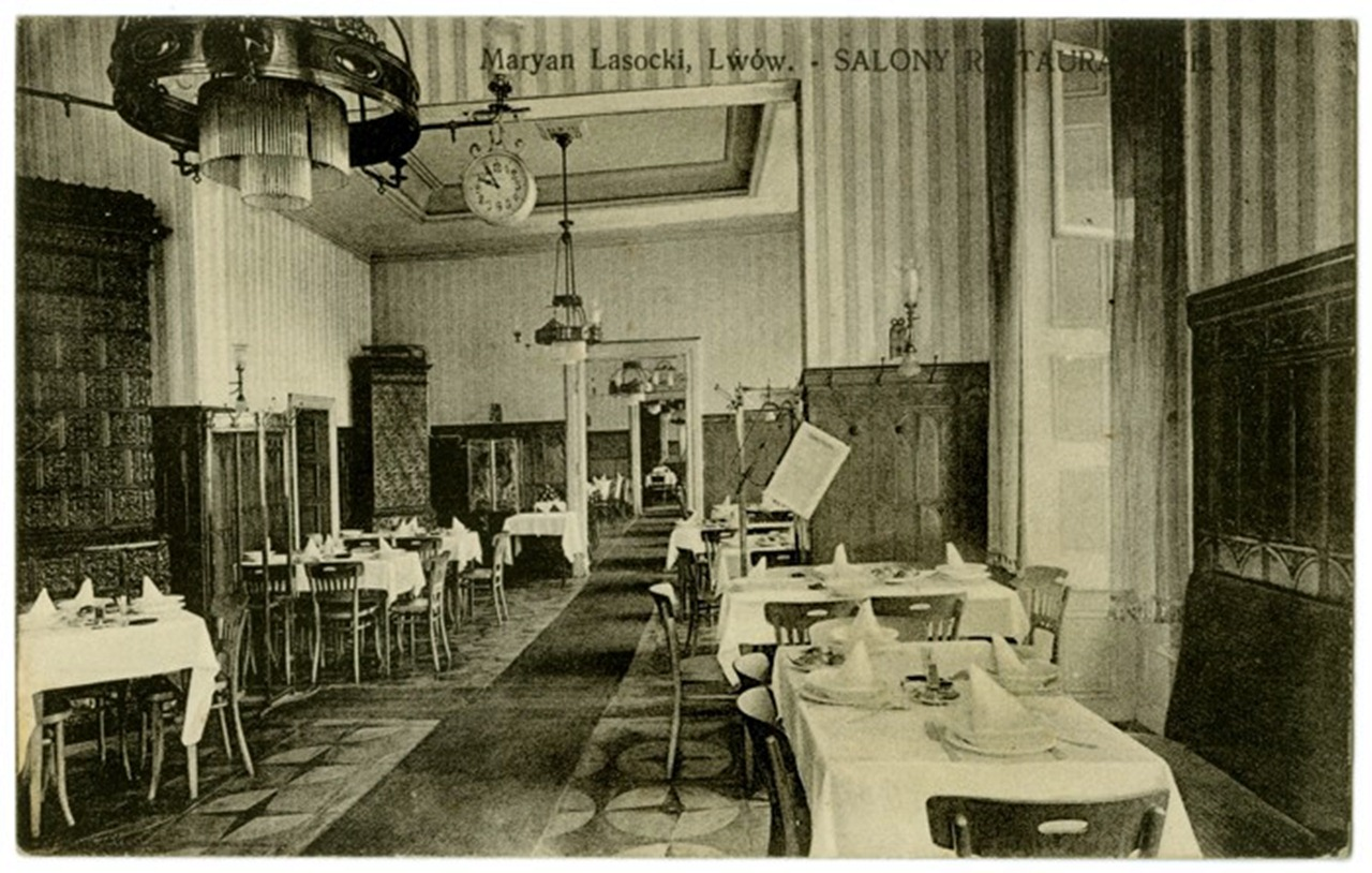 Львів